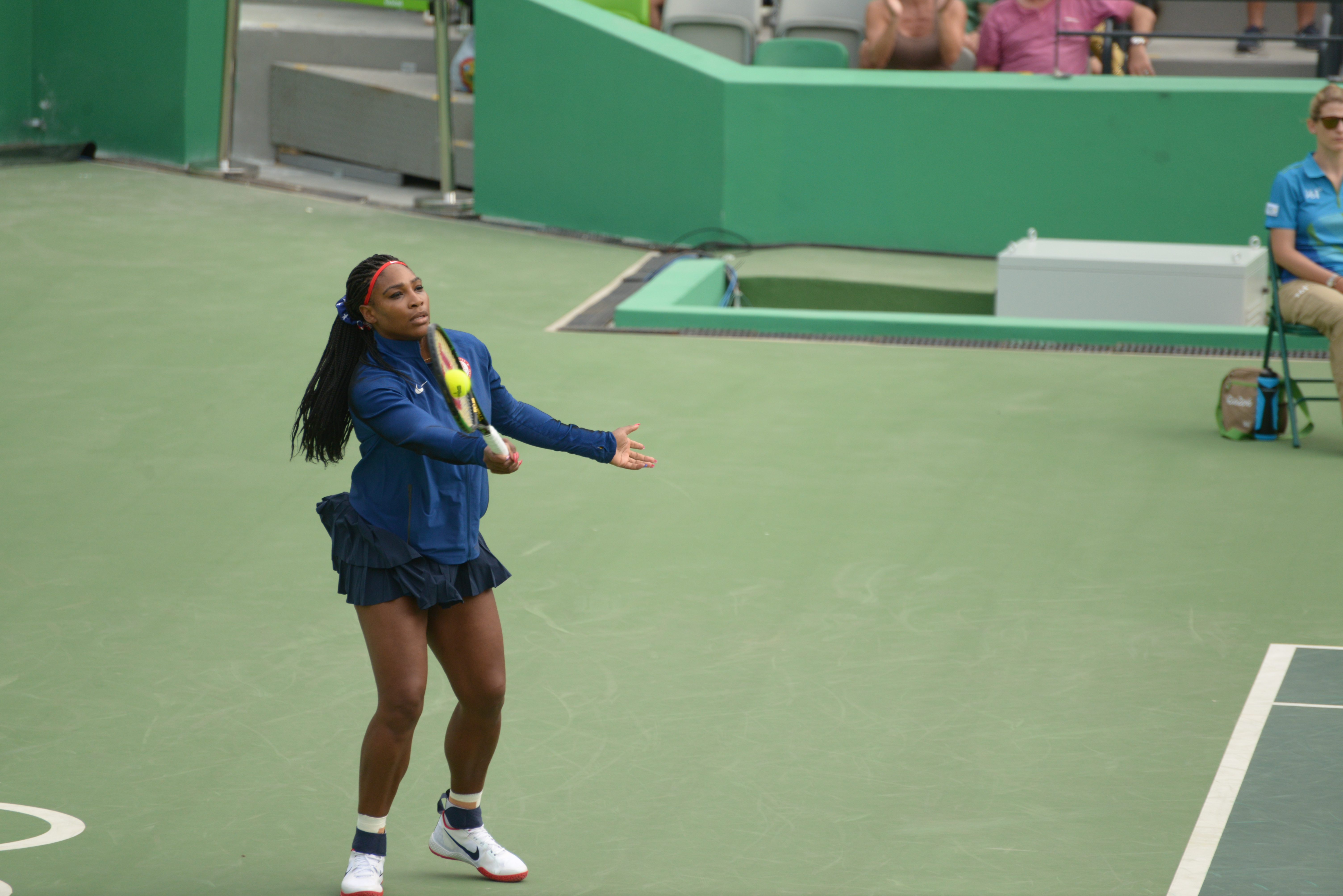 Serena Williams aquecendo para o primeiro jogo contra a australiana Daria Gavrilova